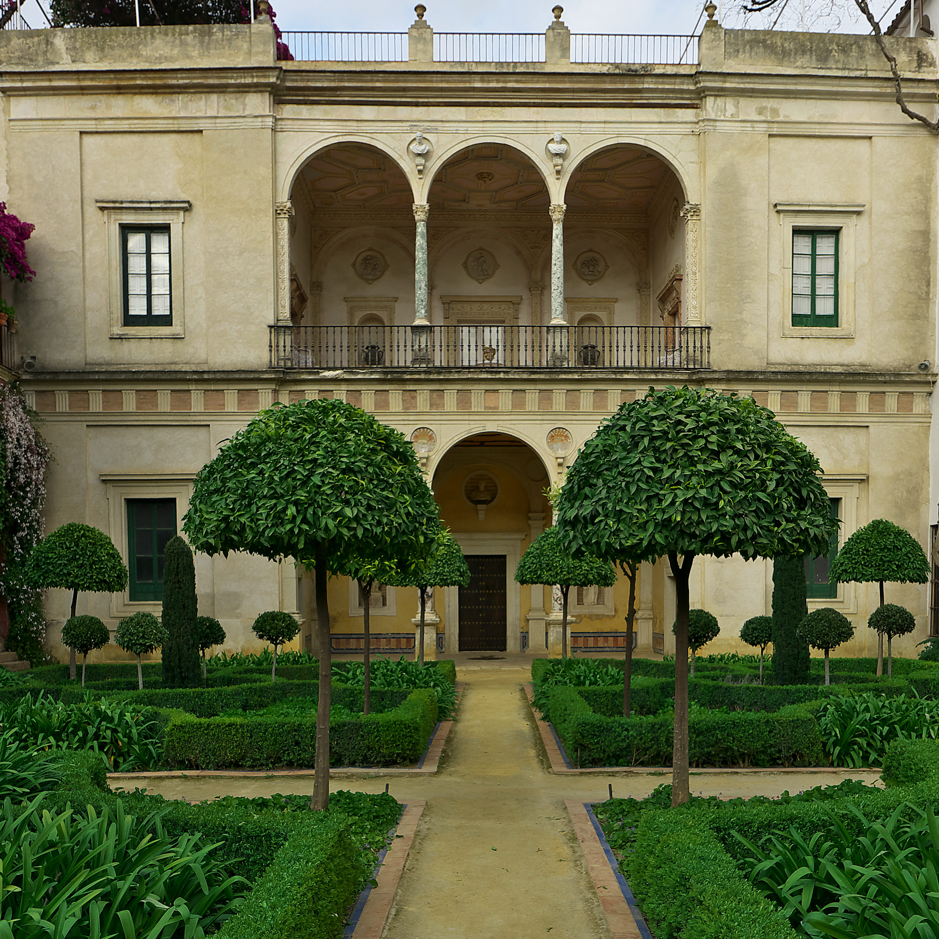 Casa de Pilatos, Sevilla. Benvenuto Tortello (h. 1568) remodela el palacio de Per Afán Enríquez de Ribera.